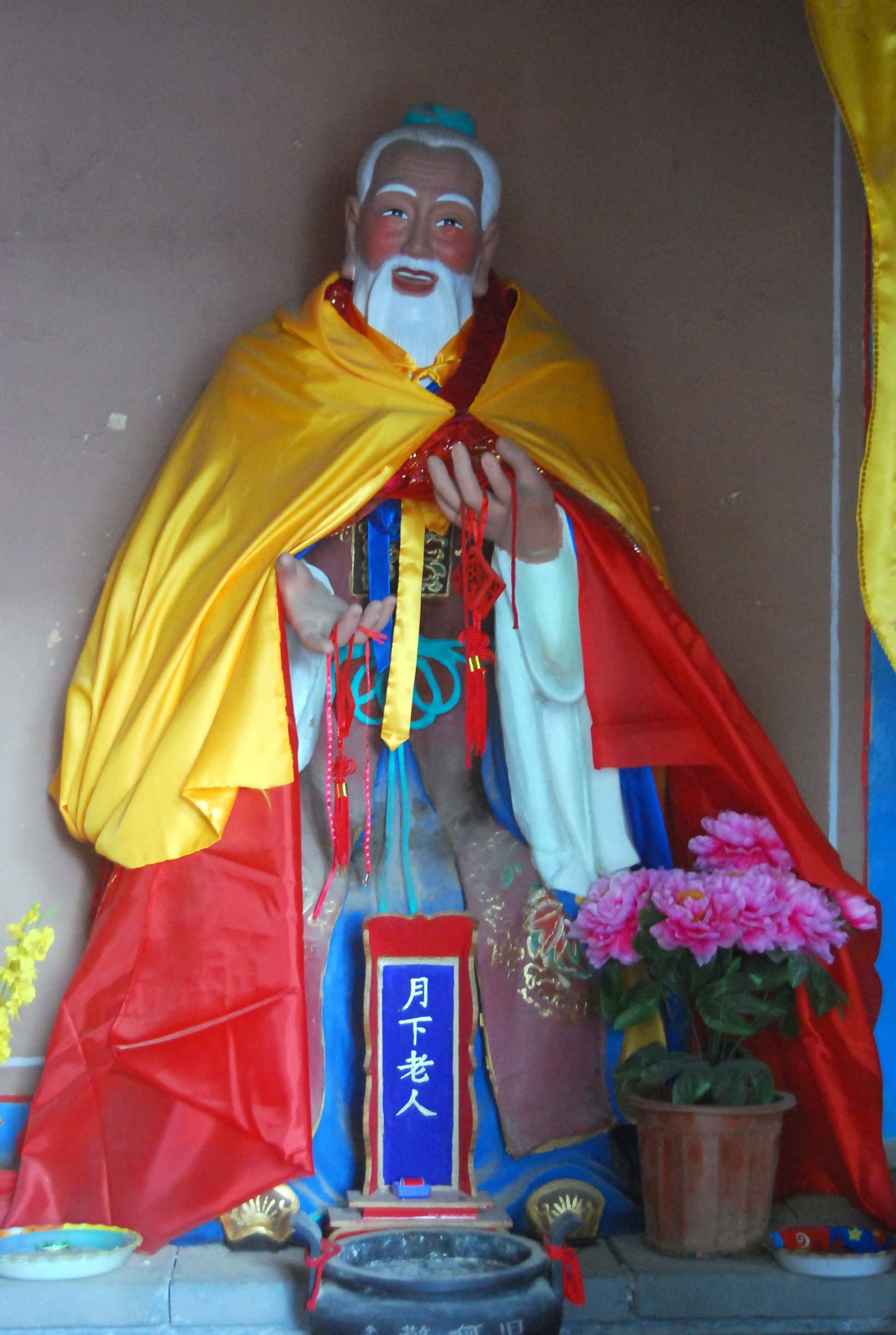 妙峰山娘娘庙月下老人